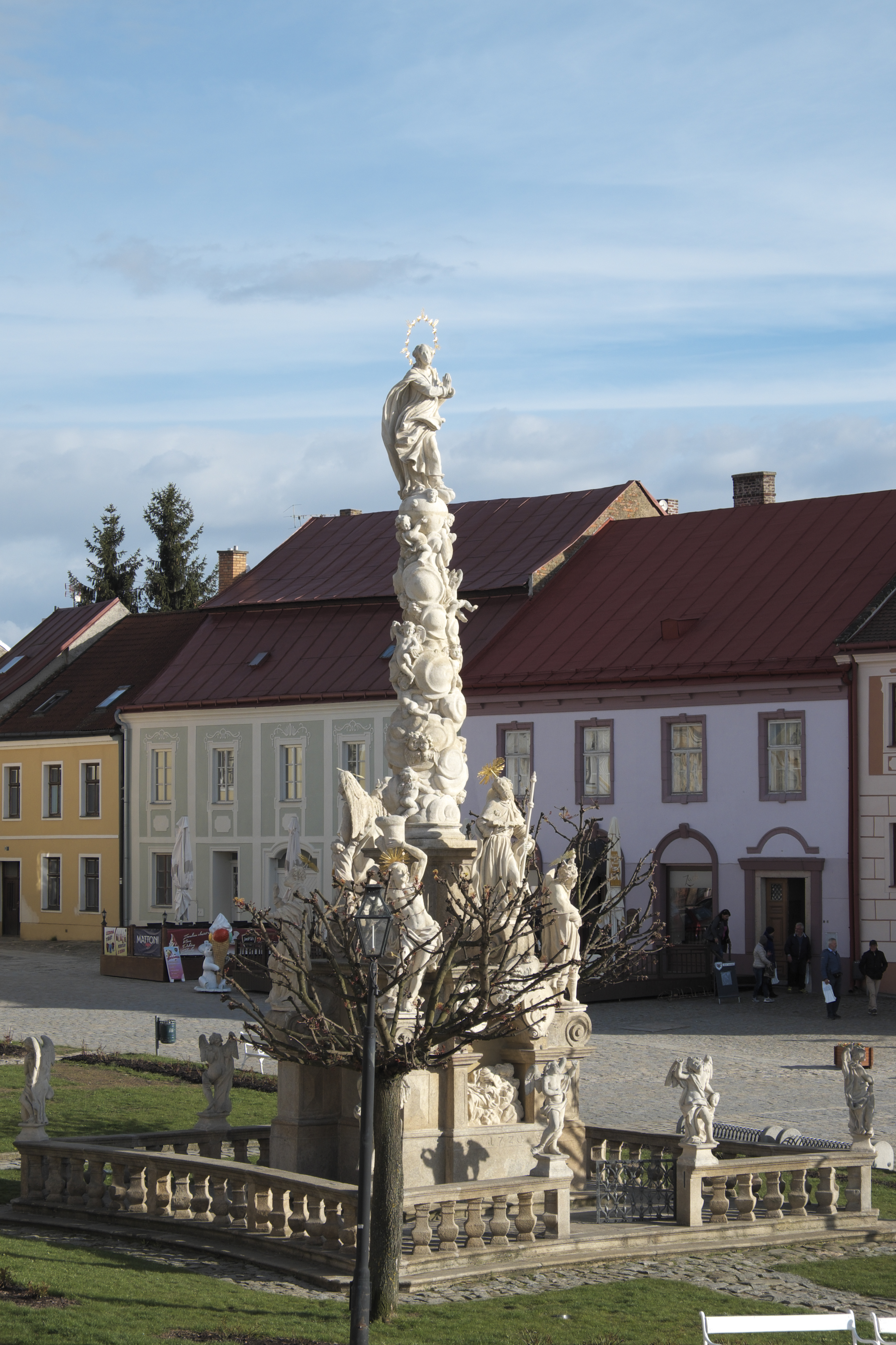 Mariensäule in Telč im Okres Jihlava in der Region Hochland (Kraj Vysočina, Tschechien)